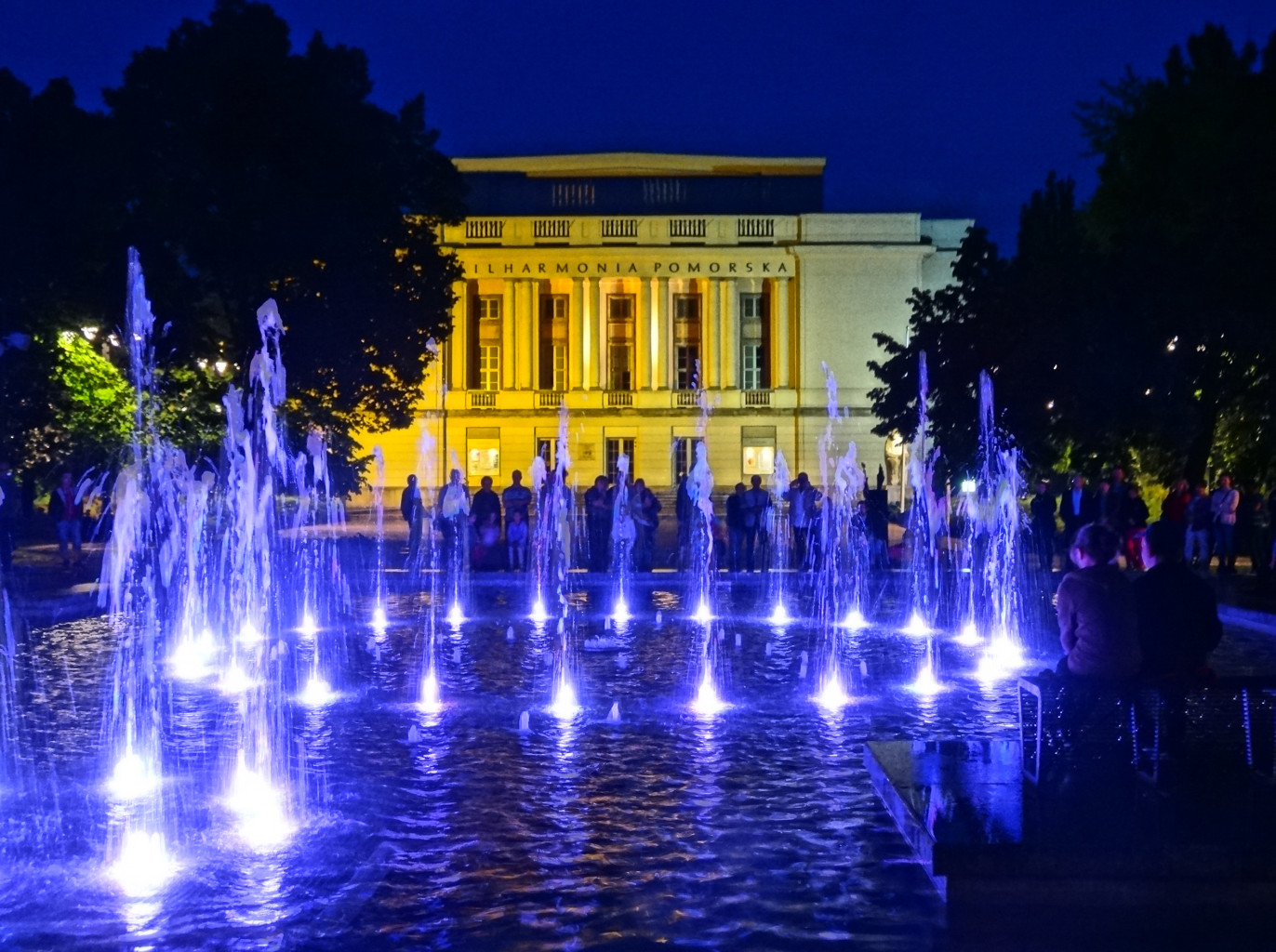 Fontanna przed budynkiem Filharmonii Pomorskiej im. Ignacego Jana Paderewskiego w Bydgoszczy, przebudowana w 2014 r., Dysponuje podświetlanymi dyszami wodnymi sterowanymi elektronicznie np. w rytm muzyki